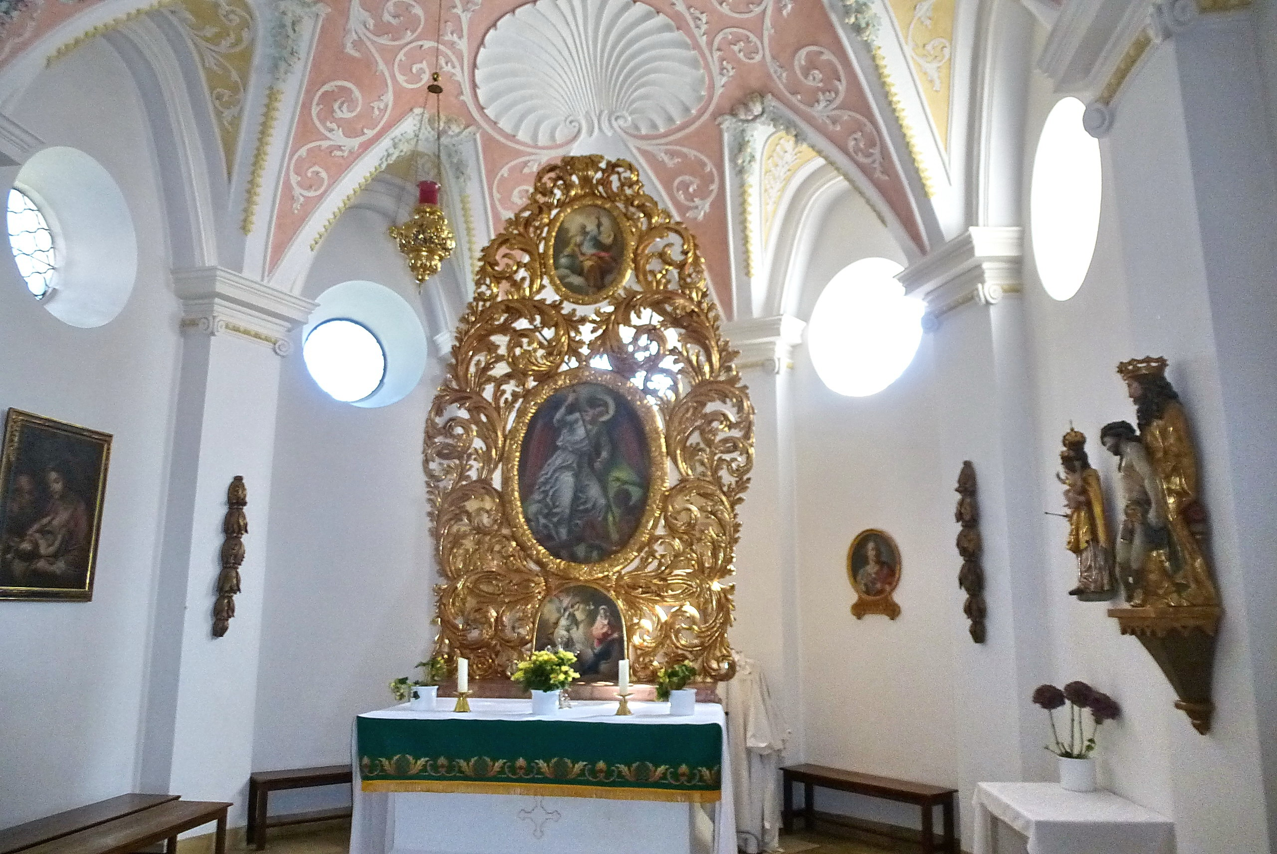 Katholische Kirche St. Jakob in Feldkirchen (Landkreis München)